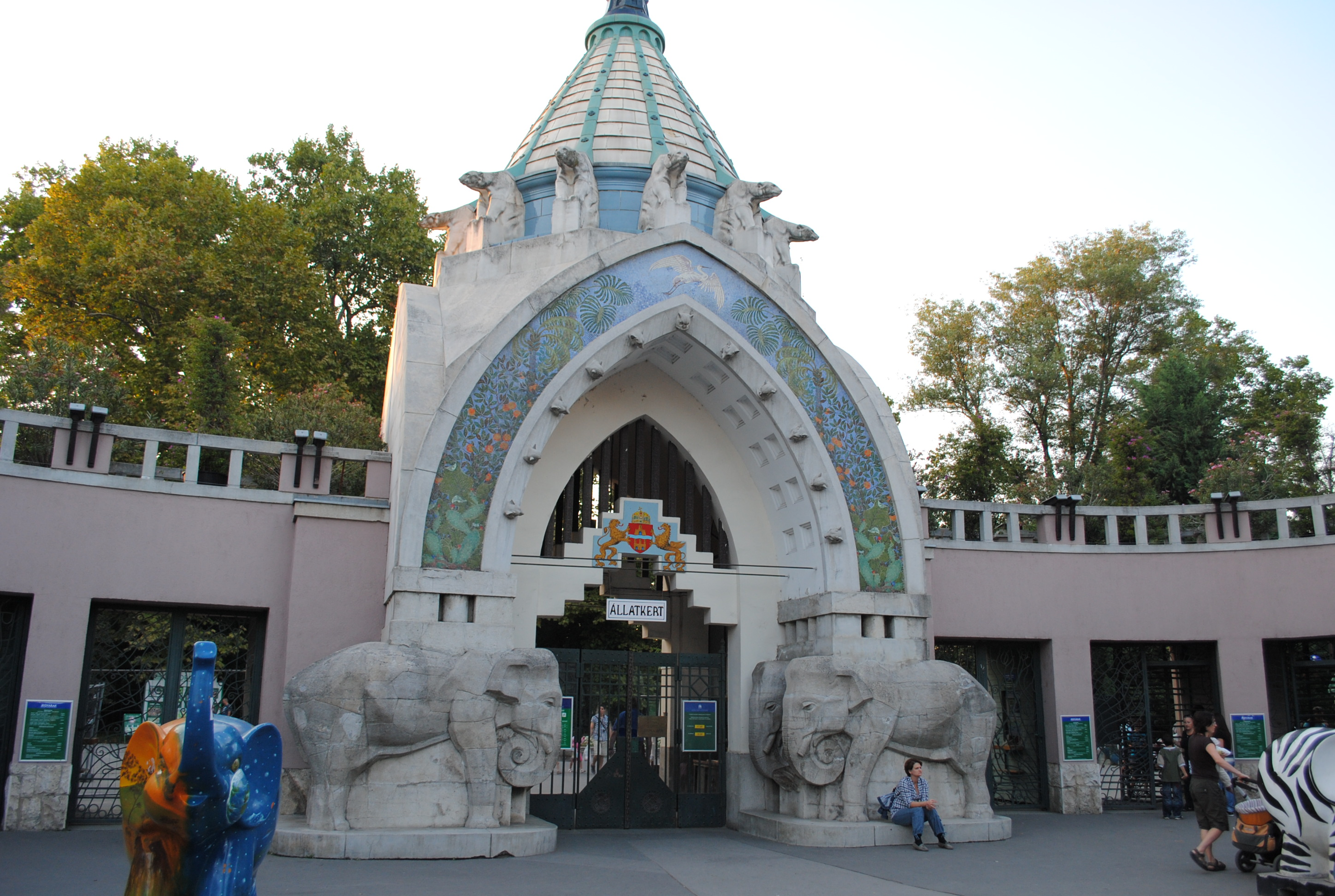 Fővárosi Állat- és Növénykert (Budapest 14, Állatkerti körút 6-12.) This is a photo of a monument in Hungary, Identifier: 1219